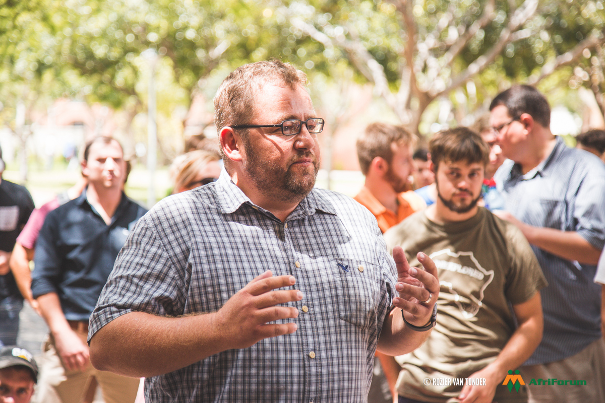 Kallie Kriel spreek Tukkies-studente toe tydens die #AfrikaansMustFall optogte. AfriForum het studente sterk standpunt ingeneem teen die afskaffing van Afrikaanse onderrig op Tukkies.